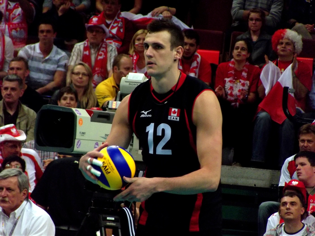 Zdjęcie zrobione podczas zawodów Ligi Światowej 2012 w katowickim Spodku.